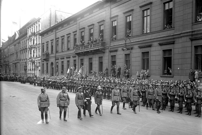 Die erste grosse Geburtstagsfeier des 85 jährigen Reichspräsidenten von Hindenburg in Berlin ! Unter dem Jubel der Bevölkerung schreitet der 85 jährige Reichspräsident die Front der Ehrenkompanie vor seinem Palais in der Wilhelmstr. ab. Hinter ihm die hohe Generalität, von rechts nach links: General von Schleicher, sein Sohn Oberst von Hindenburg, der Chef der Heeresleitung General von Hammerstein sowie Admiral Raeder.